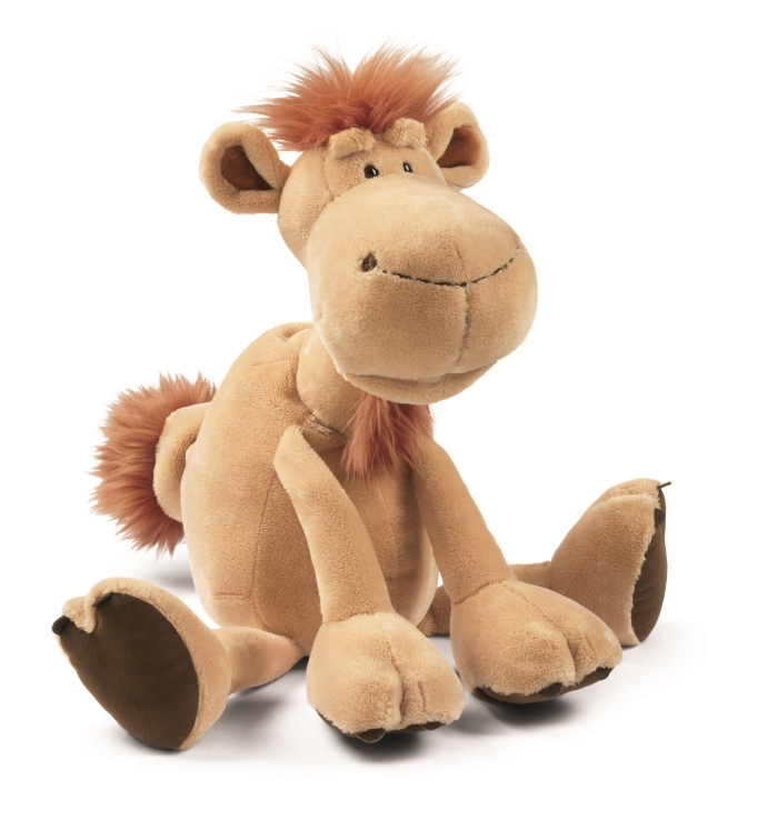 NICI Wild Friends - Kamel